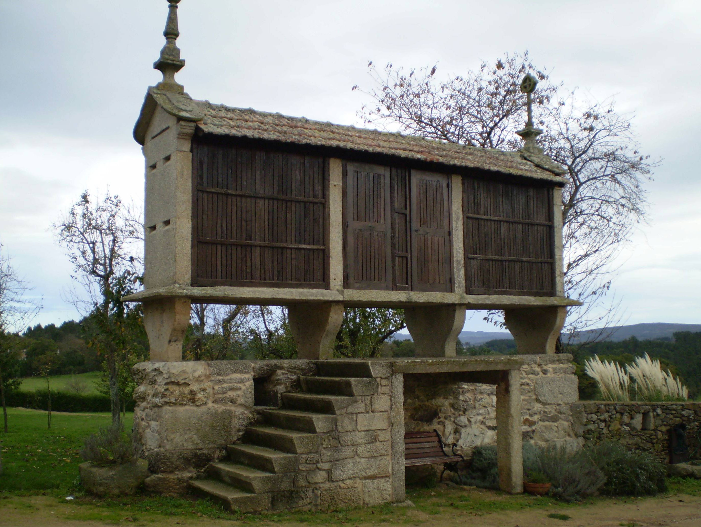 Hórreo tipo mahía, de tres claros, adornado con cruz celta e lampeón fusiforme. Cuberta de tella "inglesa", asentado sobre soleira de mampostería con elevación con catro cepas copiformes.